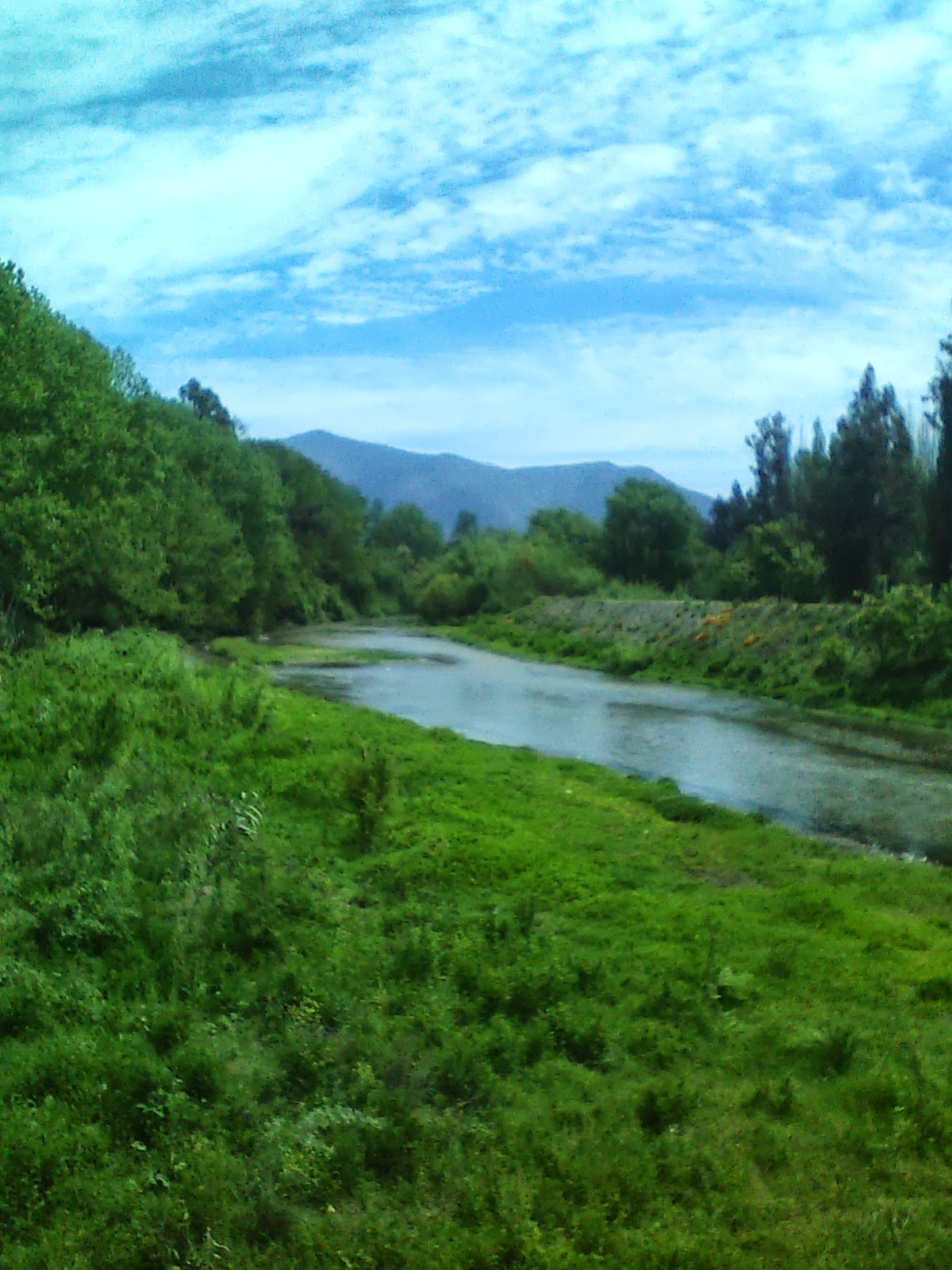 Rio Angostura, Valdivia De Paine, Chile